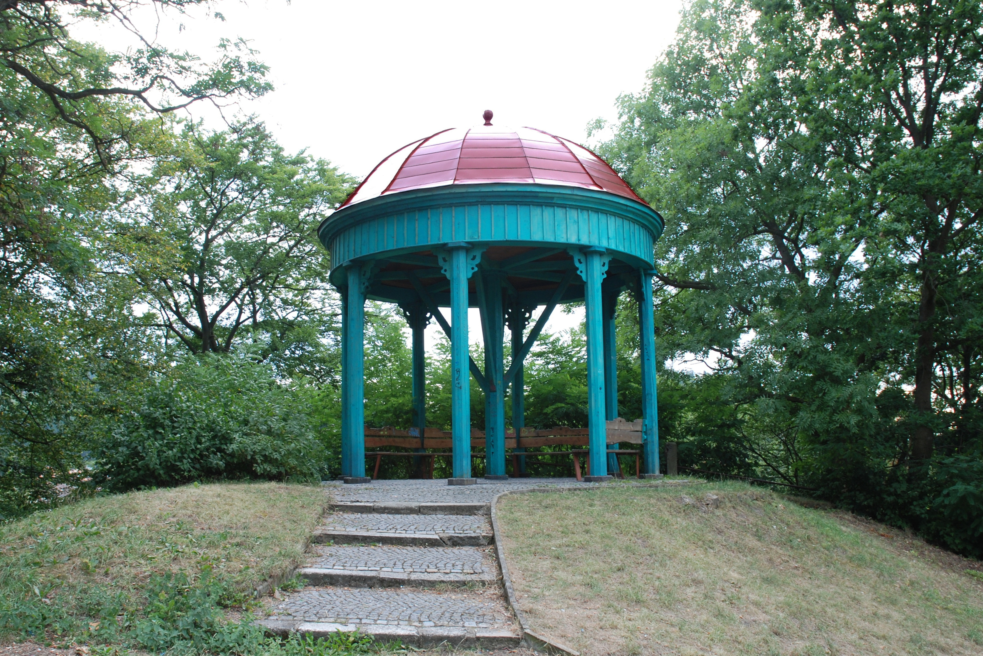 Altán Bellevue na návrší v parku městské části Drahovice v Karlových Varech